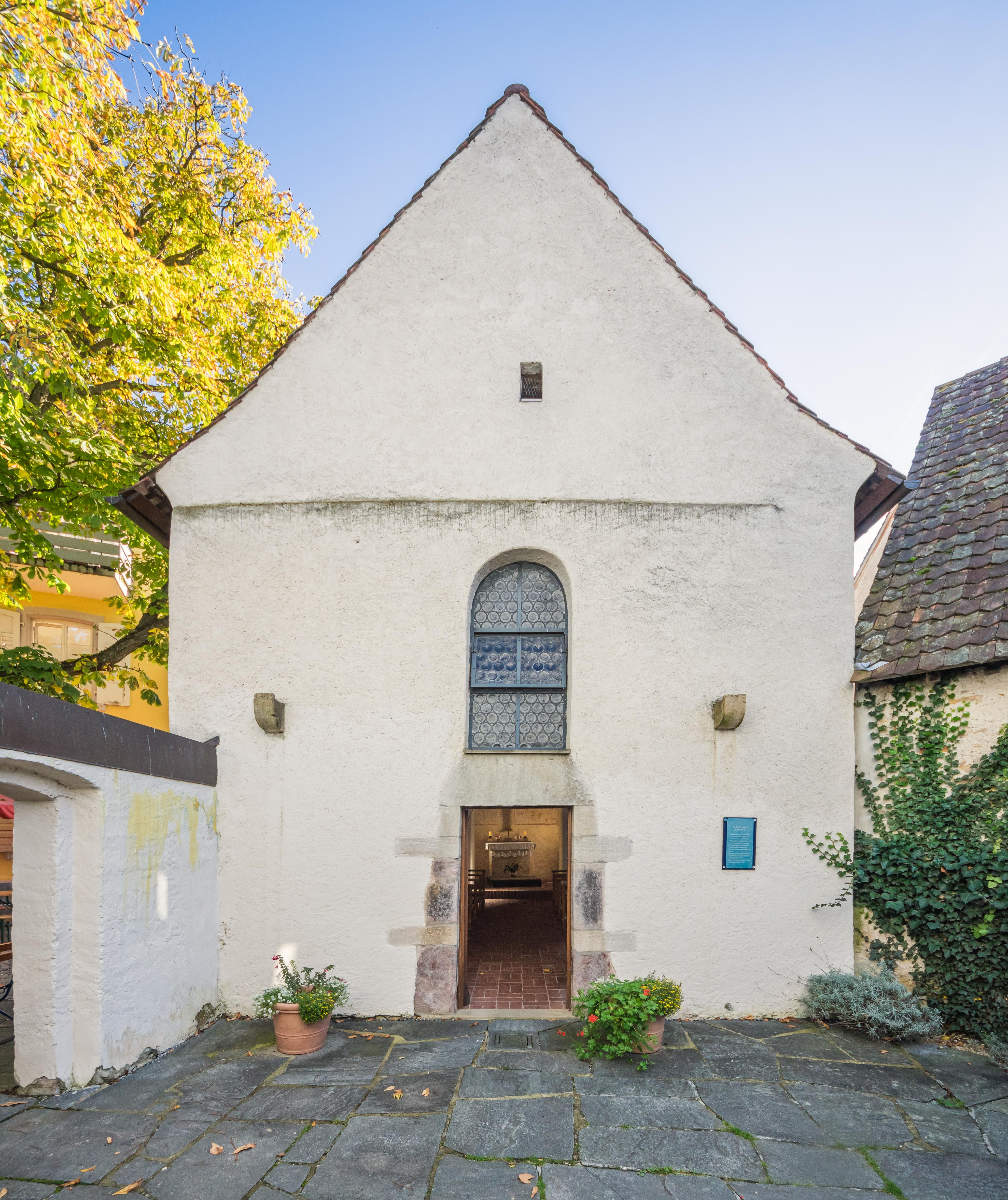 Bilder aus Bad Krozingen Blick zum Eingang der Kapelle